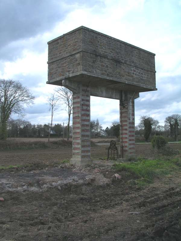 Le château d'eau des Chemins de Fer des Côtes-du-Nord à Plouëc-du-Trieux en 2005